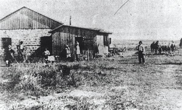 כפר סבא - ה"חאן הראשון"